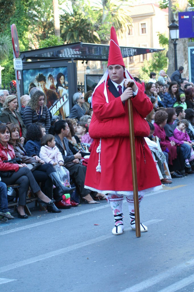 Imagen de la indumentaria de un estante (nazareno portapasos) en la Semana Santa de Murcia, cuyo origen se remonta al siglo XVIII.